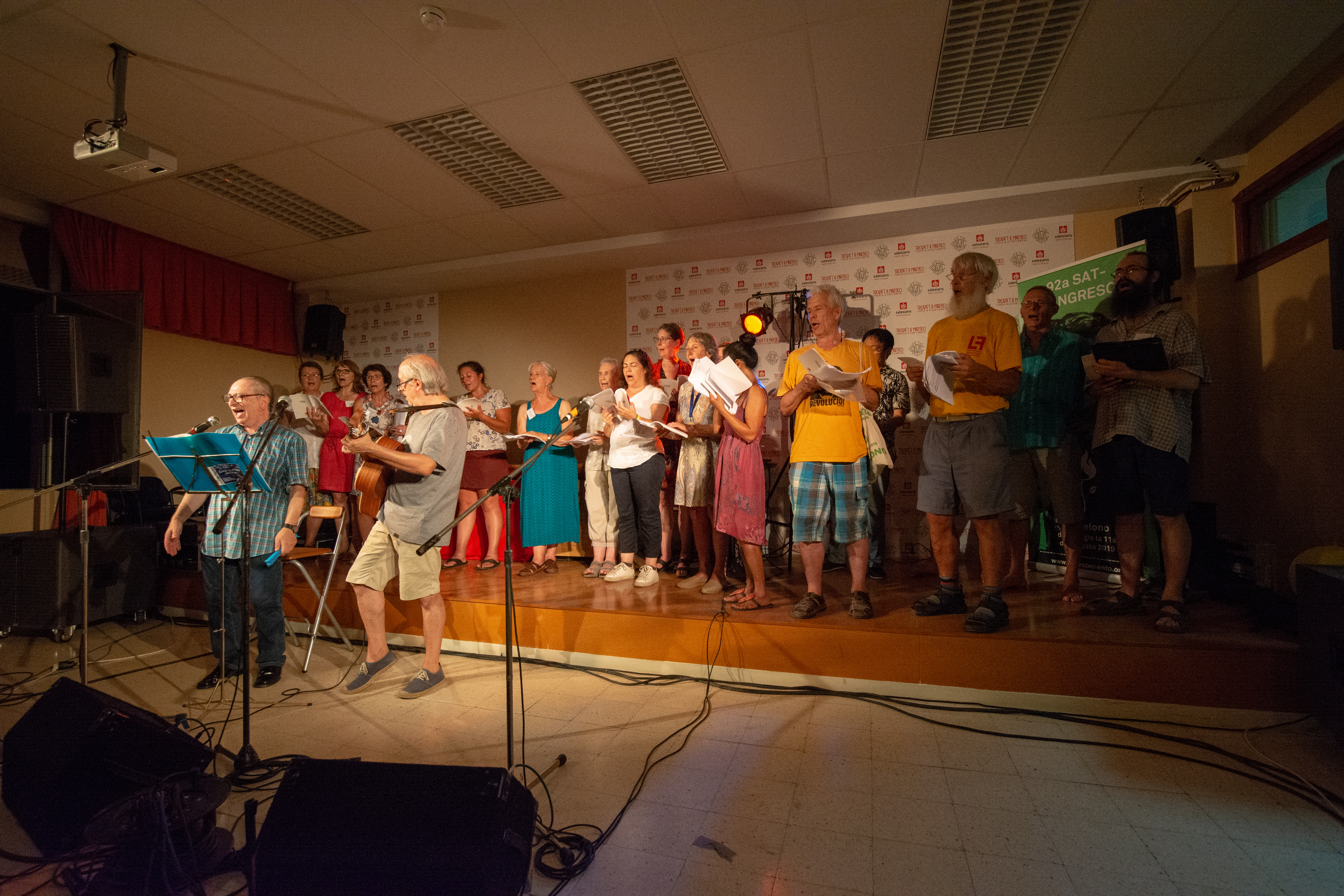 Kantado de la kongresa koruso dum la SAT-Kongreso 2019